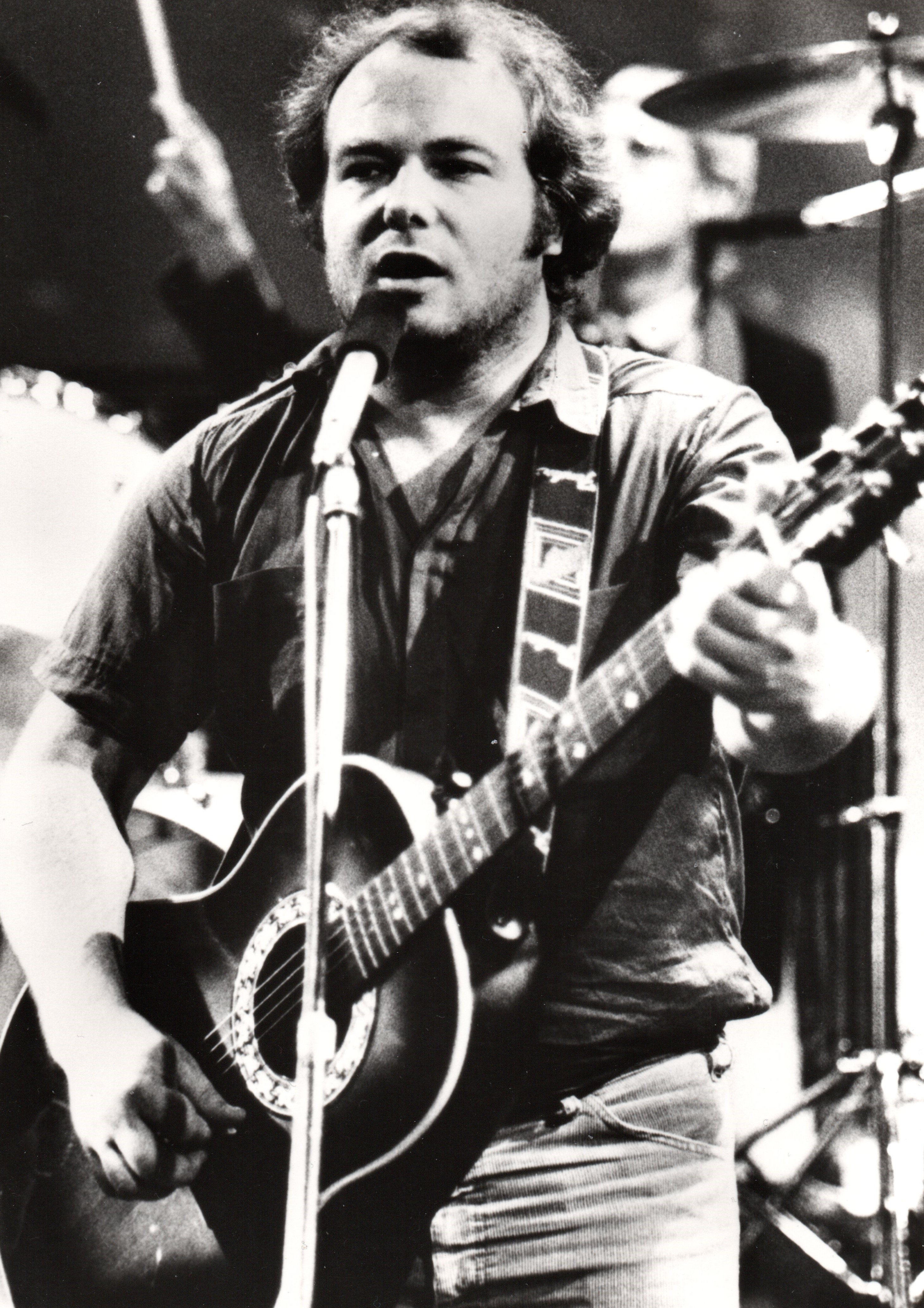 Johnny Tame alias Uwe Reuß